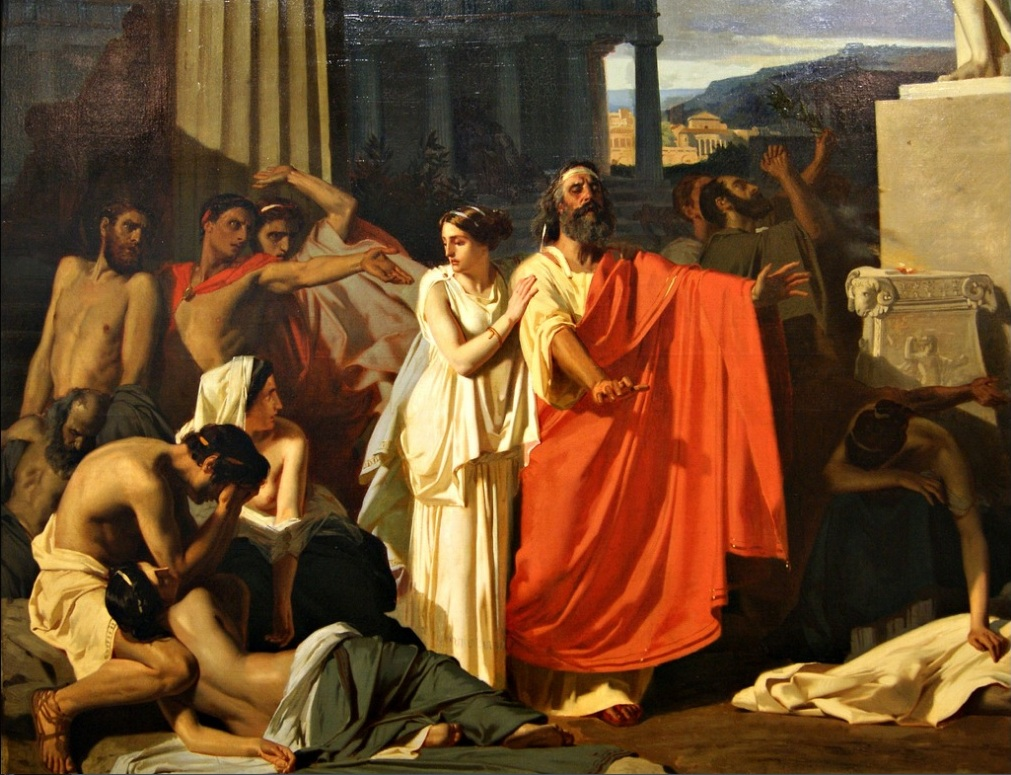 Eugène Ernest Hillemacher, Oedipe s'exilant à Thèbes, 1843, Orléans, musée des Beaux-Arts